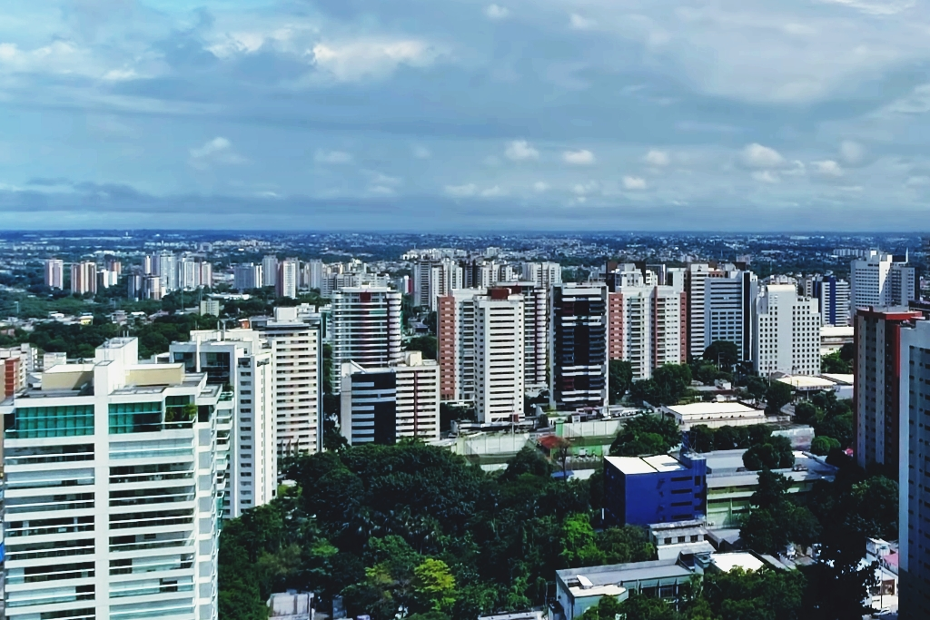 Verticalização do bairro Adrianópolis, zona Centro-Sul da cidade de Manaus, Brasil.